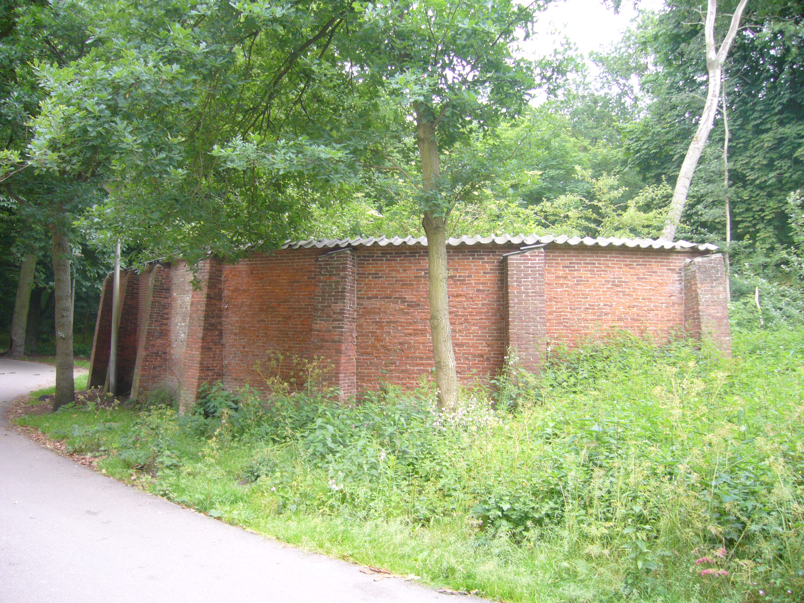 Landgoed Meer & Bos, oude muur bij de moestuin